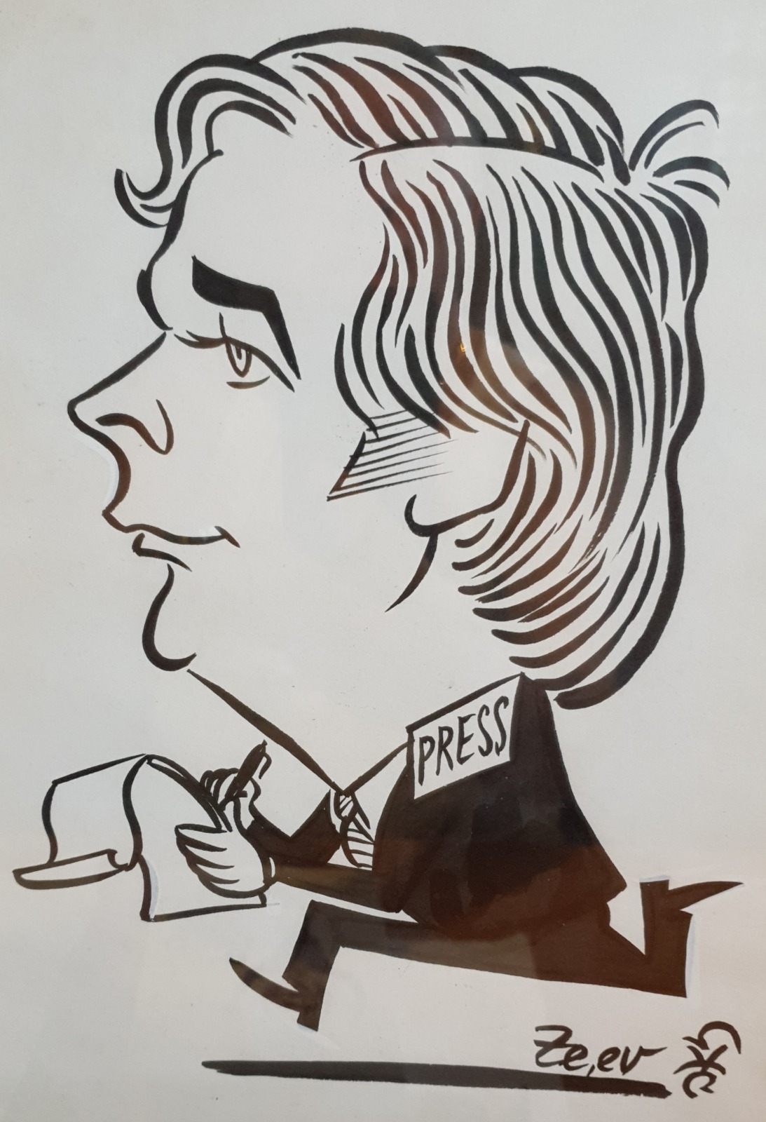 קריקטורה של מוטי רוזנבלום שצוירה על ידי זאב (יעקב פרקש) באמצע שנות ה-80 של המאה ה-20